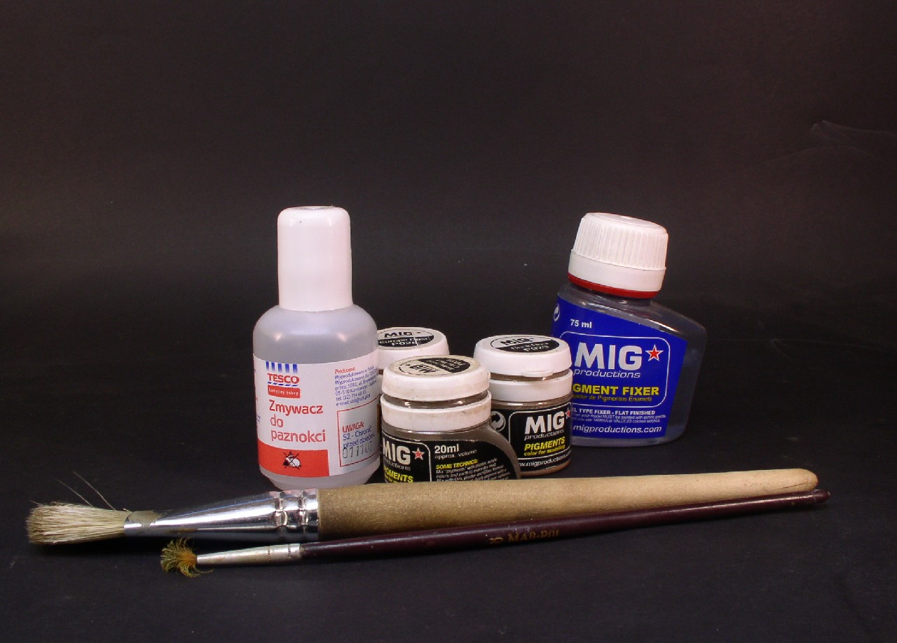 Materiały niezbędne do nakładania pigmentów za pomocą aerografu